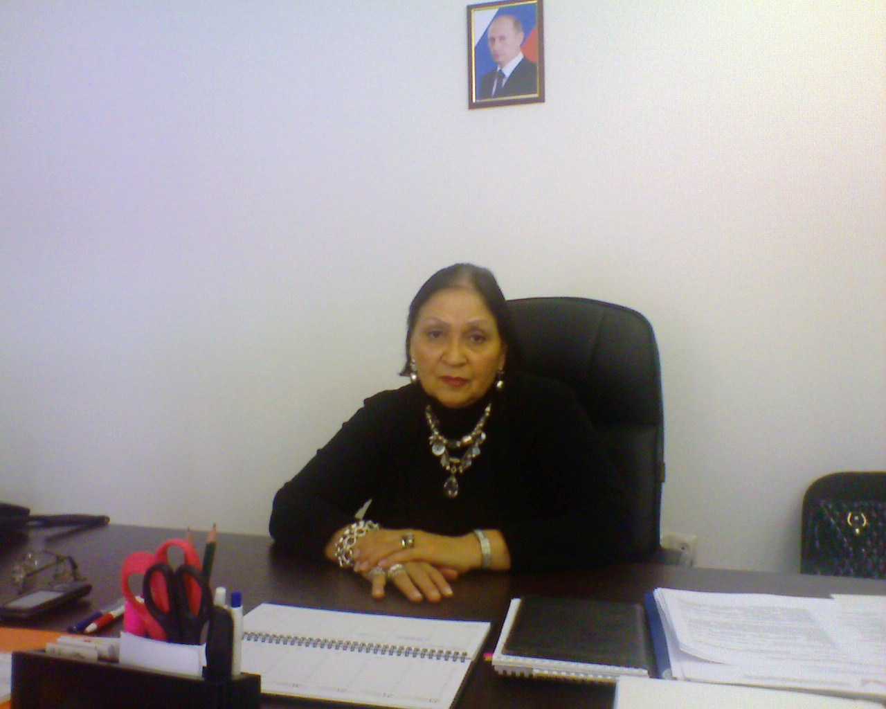 Руководитель штаба В.В. Путина, выборы Президента 2012г.